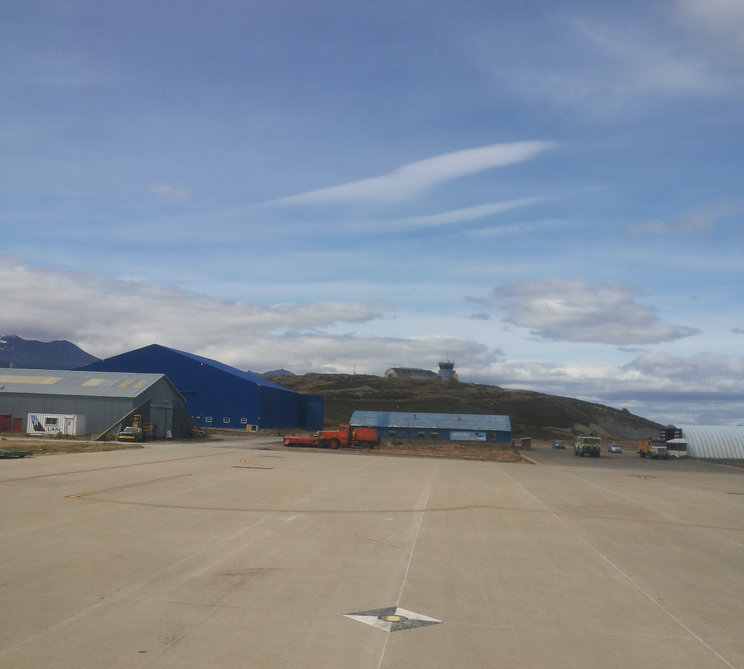 Instalaciones USH - Malvinas Argentinas Airport